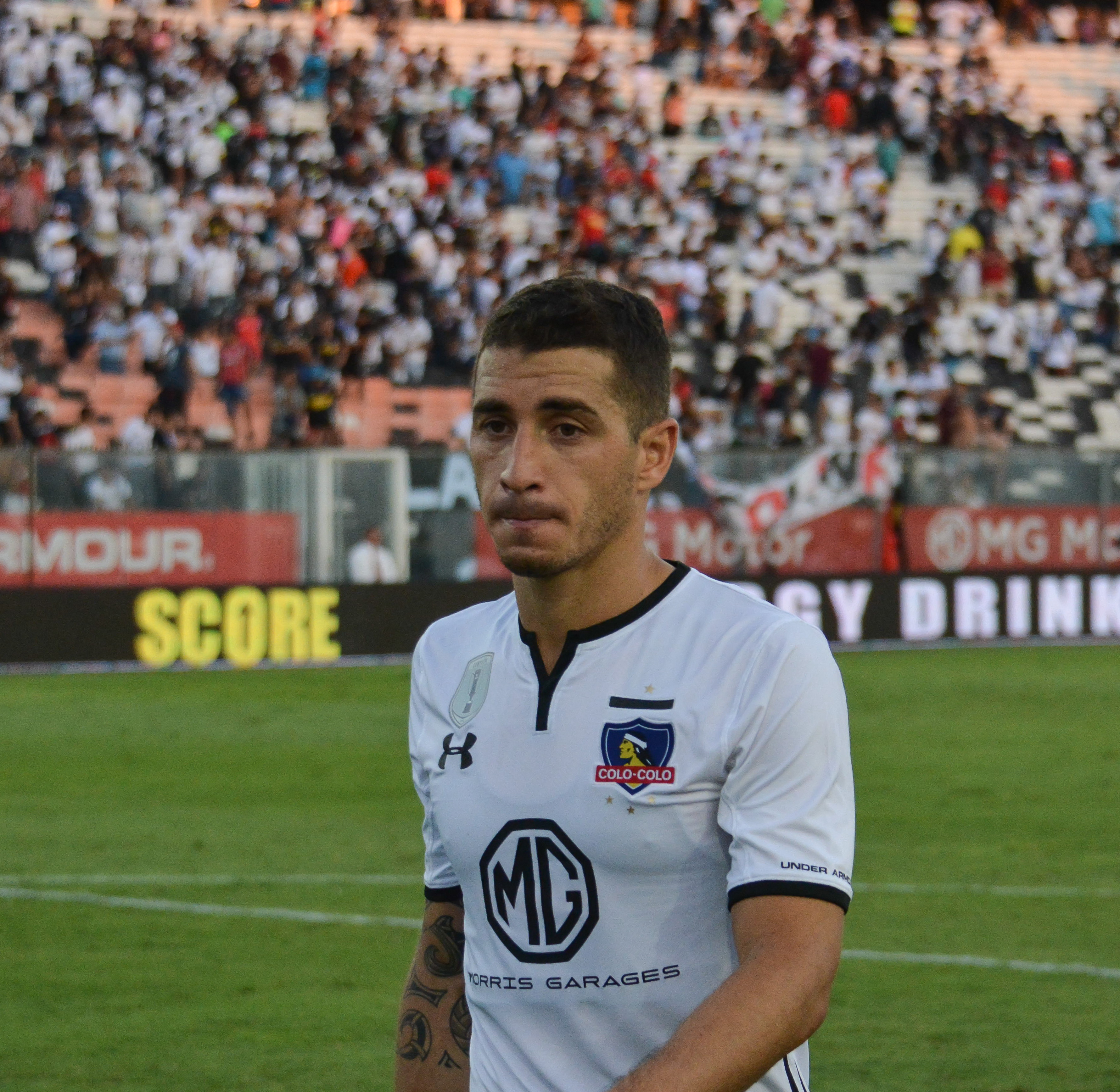 Carlos Carmona, Colo Colo v Huachipato, Estadio Monumental, Santiago, Chile.